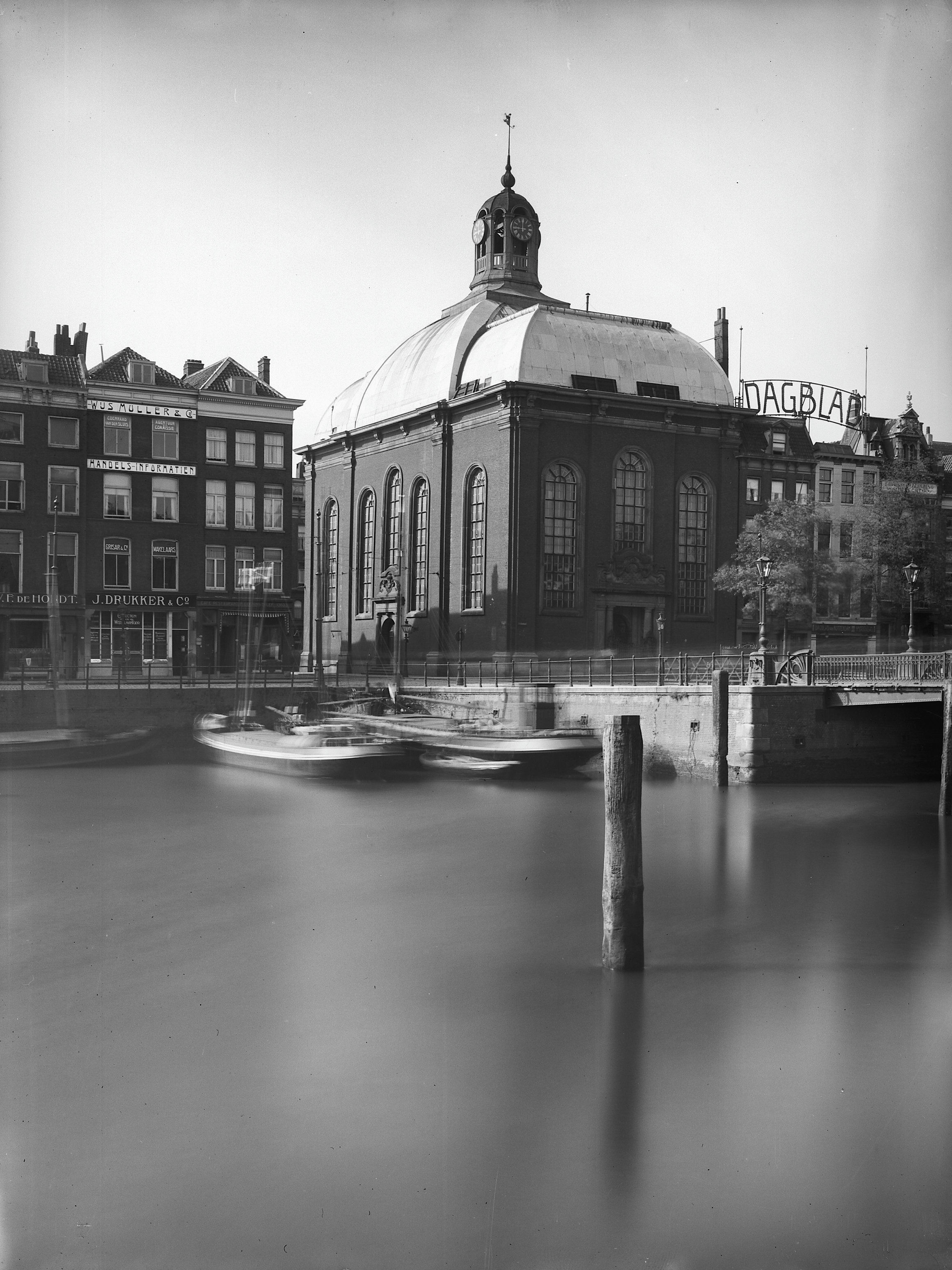 Lutherse Kerk: zuid Blaak naar het zuid-westen